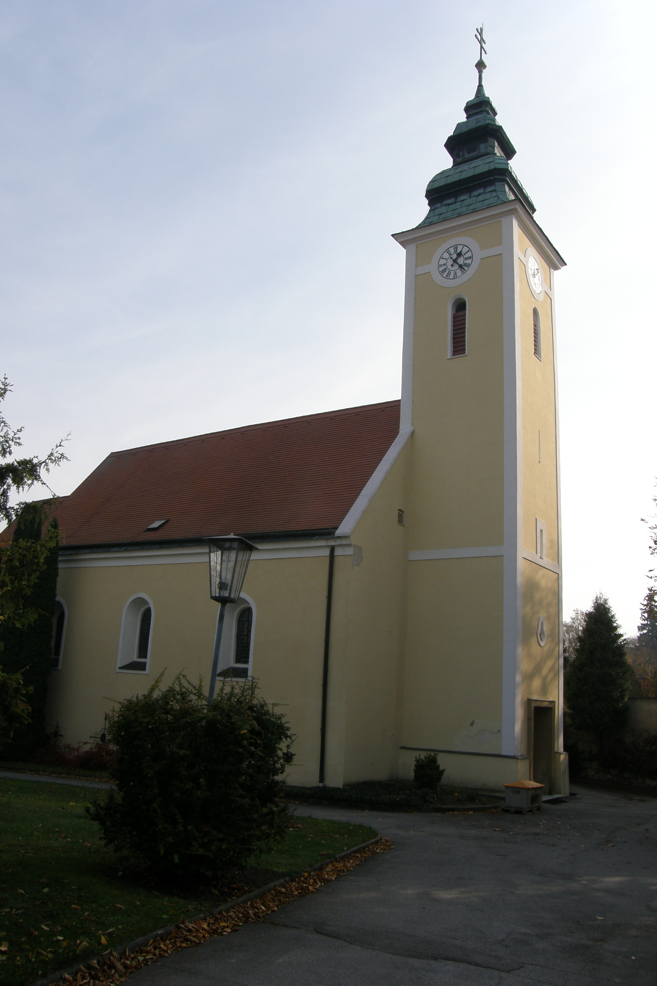 Kath. Pfarrkirche hl. Dorothea